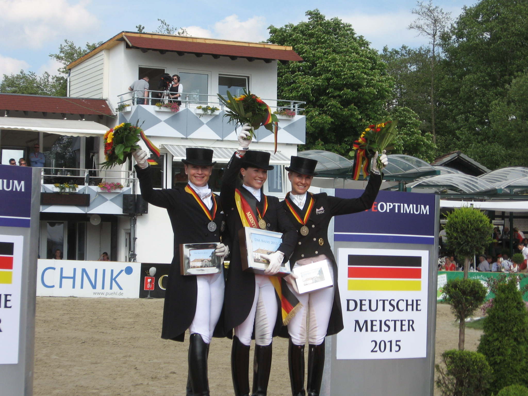 Siegerehrung der Deutschen Meisterschaft im Grand Prix Special beim Balve Optimum. Siegerin Kristina Sprehe (Mitte), zweiter Platz Isabell Werth (Links) und dritter Platz Jessica von Bredow-Werndl (rechts).